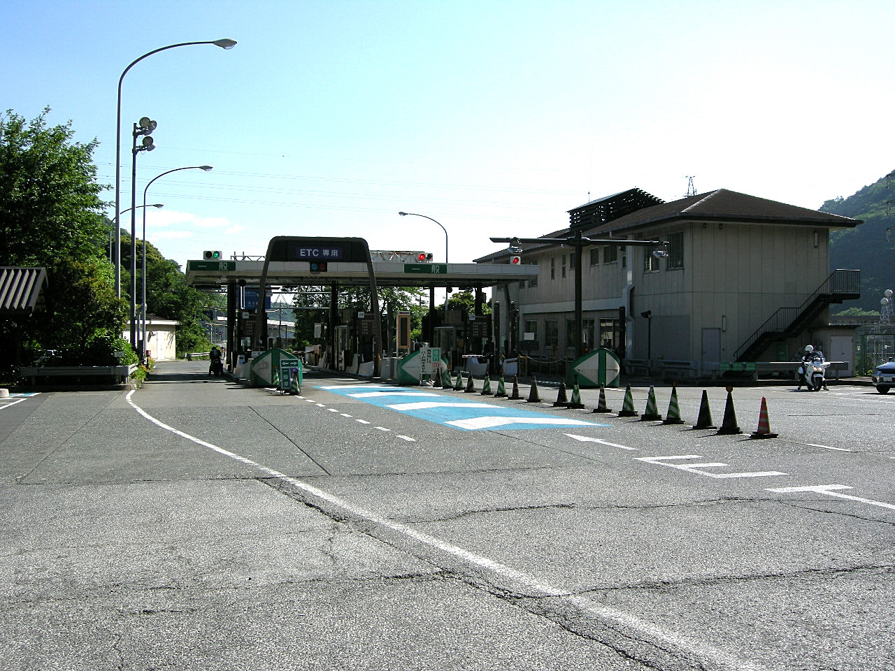 Hakoneshindo tollgate.